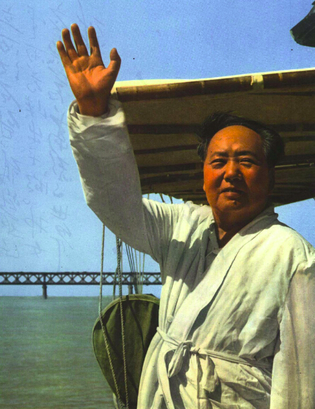 1966-10 1966年毛泽东游长江2